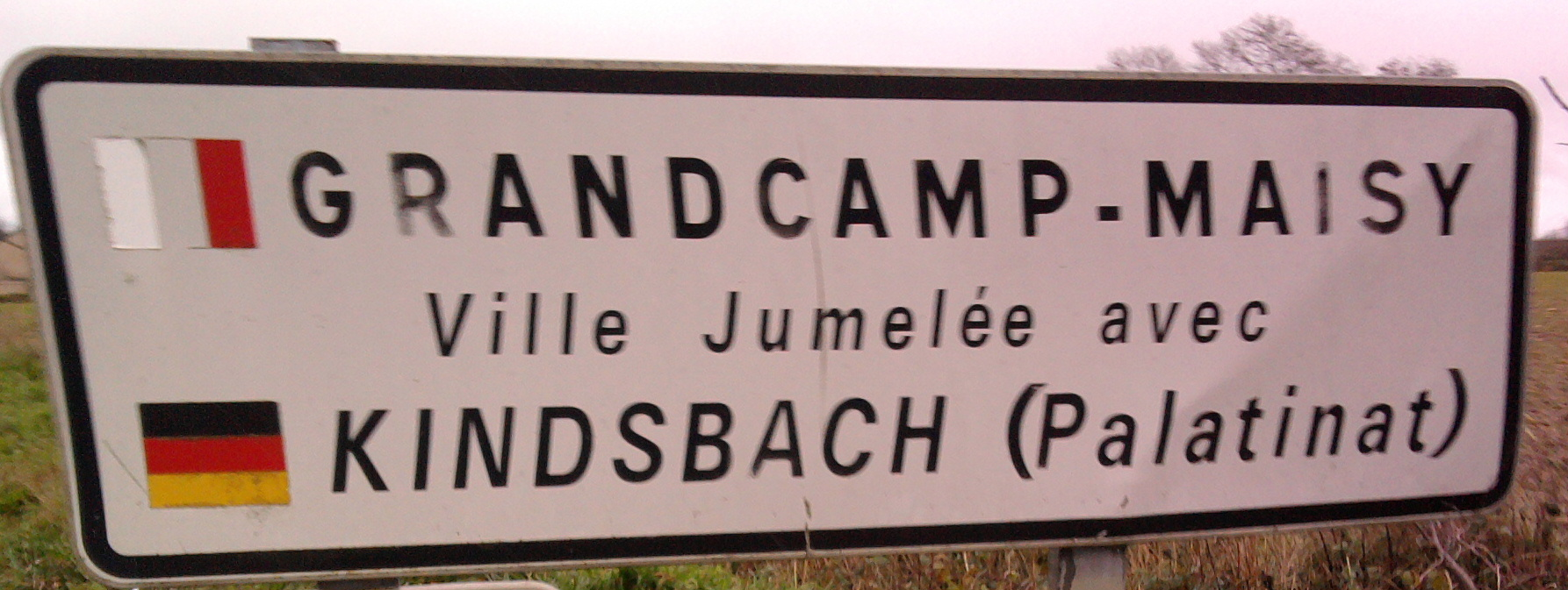 PANNEAUJUMELAGE ENTREE GRANDCAMP PAR RN13